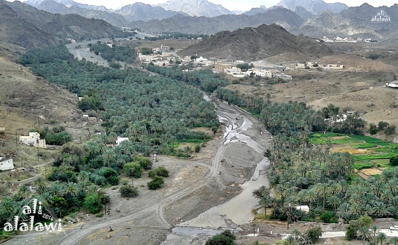 بلدة الوقبة بشمال ولاية ينقل سلطنة عمان